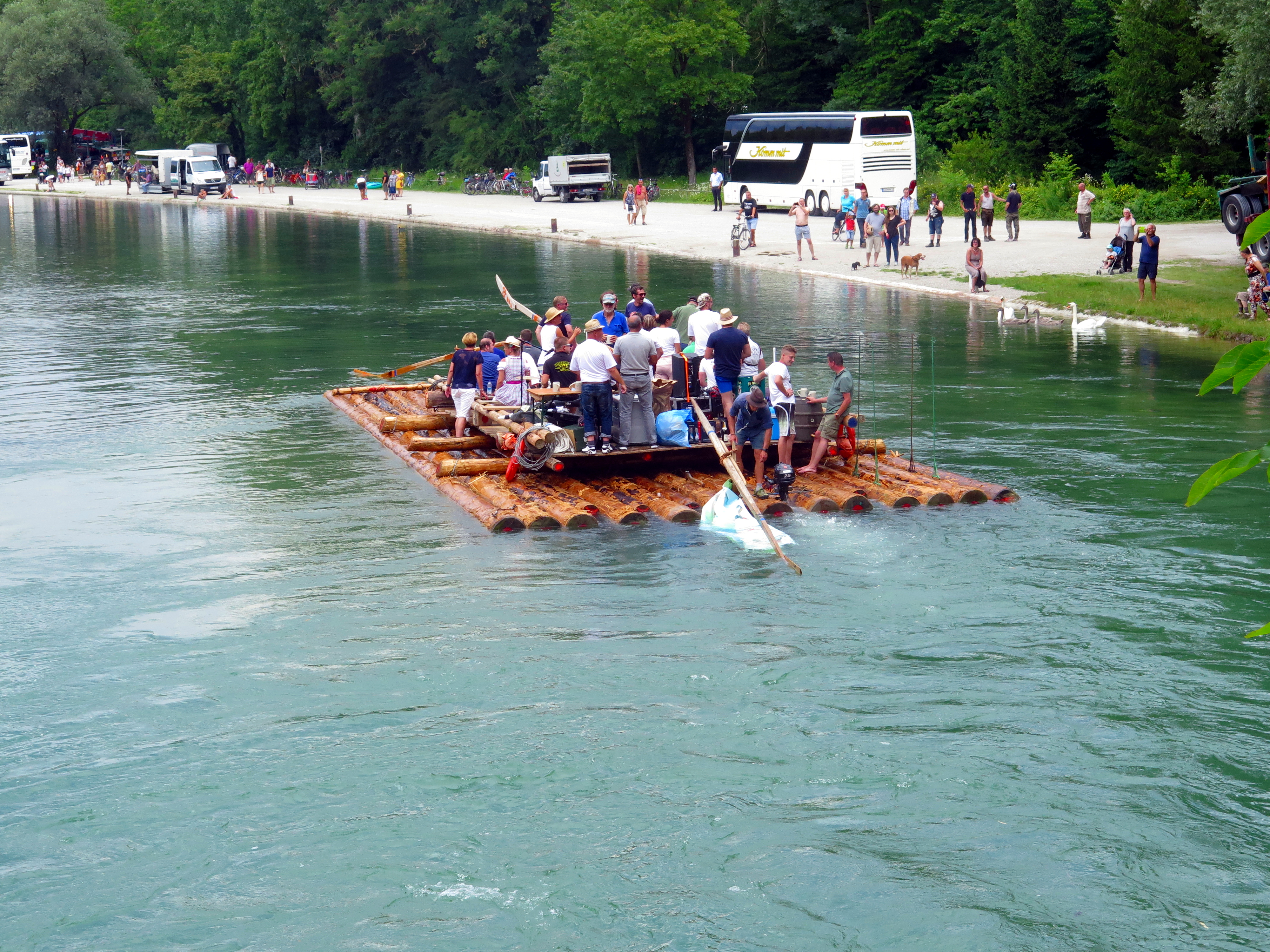 Ein Floß kurz vor dem Ziel Floßlände